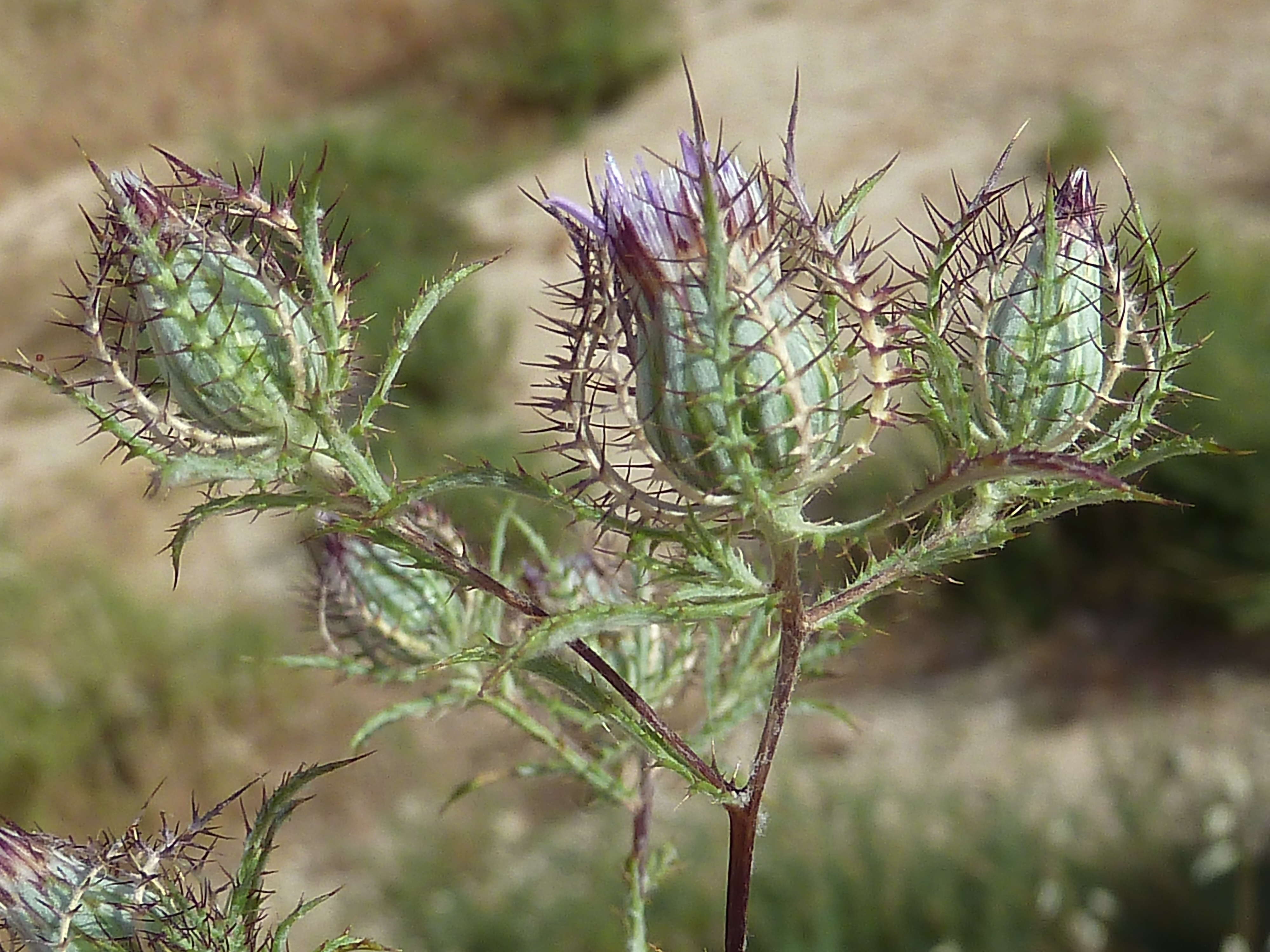 Atractylis cancellata (cancelillos, cardo enrejado,...) - Capítulos en diversos estados de desarrollo. circa Villa Suzana, Colonia Illicitana, Albatera (Provincia de Alicante, España).